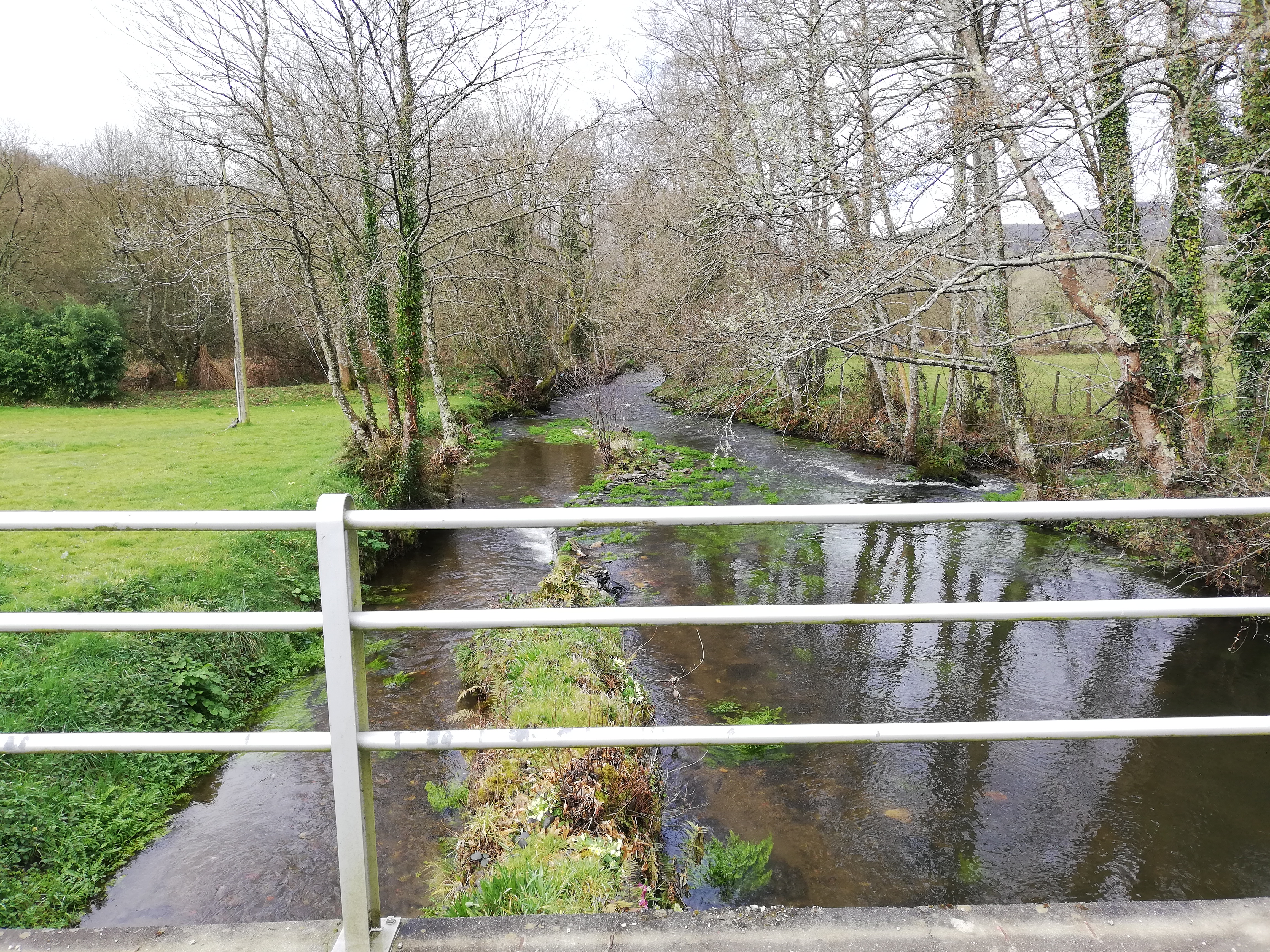 Río Anllo ao seu paso por Fanoi, Abadín.